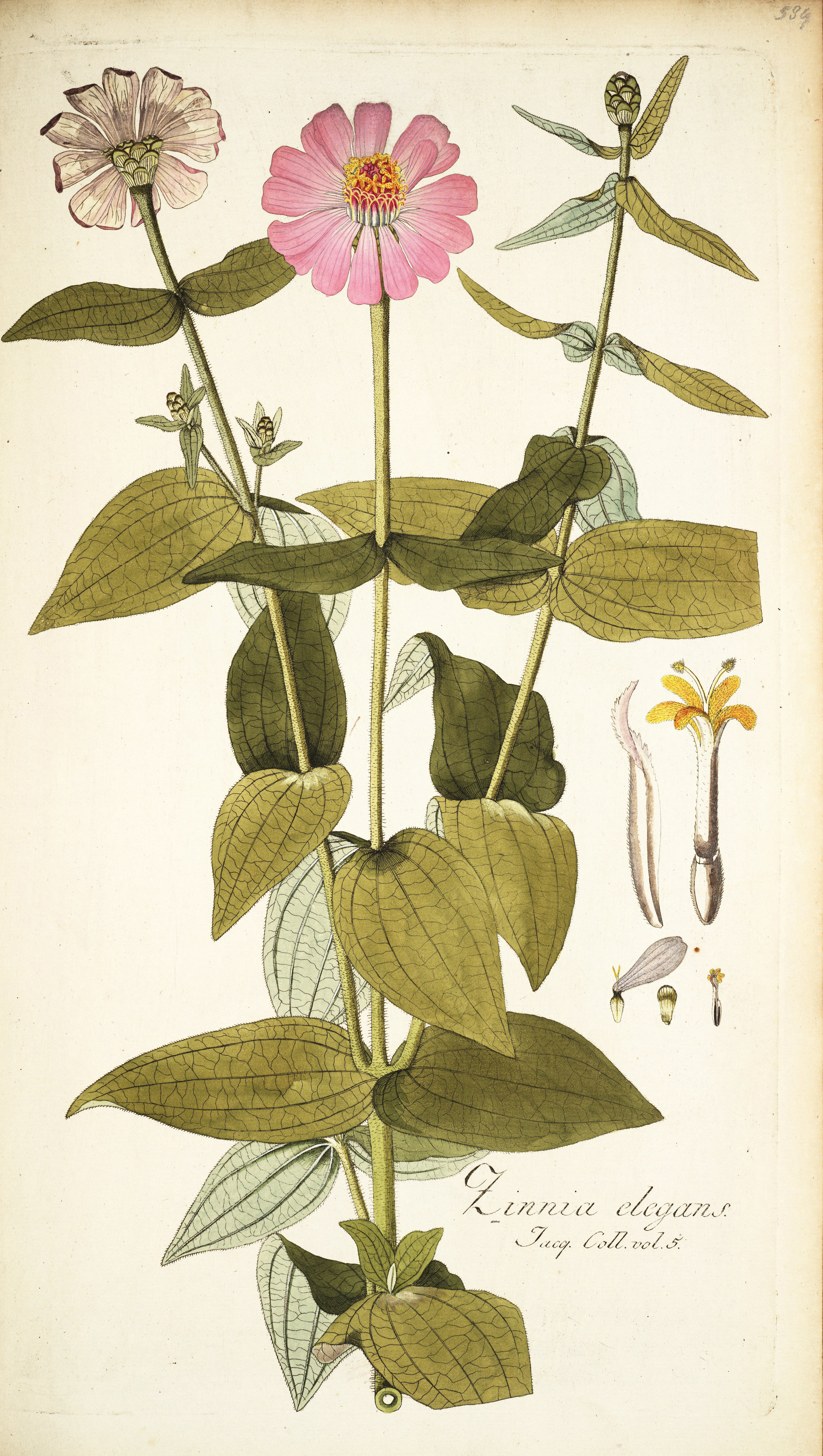 Legende: Oberer Teil der Pflanze. Spreublatt (vergr.). Zwittrige Röhrenblüte (vergr.). Weibliche Strahlenblüte. Hüllblatt. Zwittrige Röhrenblüte, von Spreublatt umschlossen.